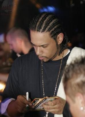 Selbst gemachtes Foto. Aufgenommen bei einer Autogrammstunde im Siegerland, südliches NRW.